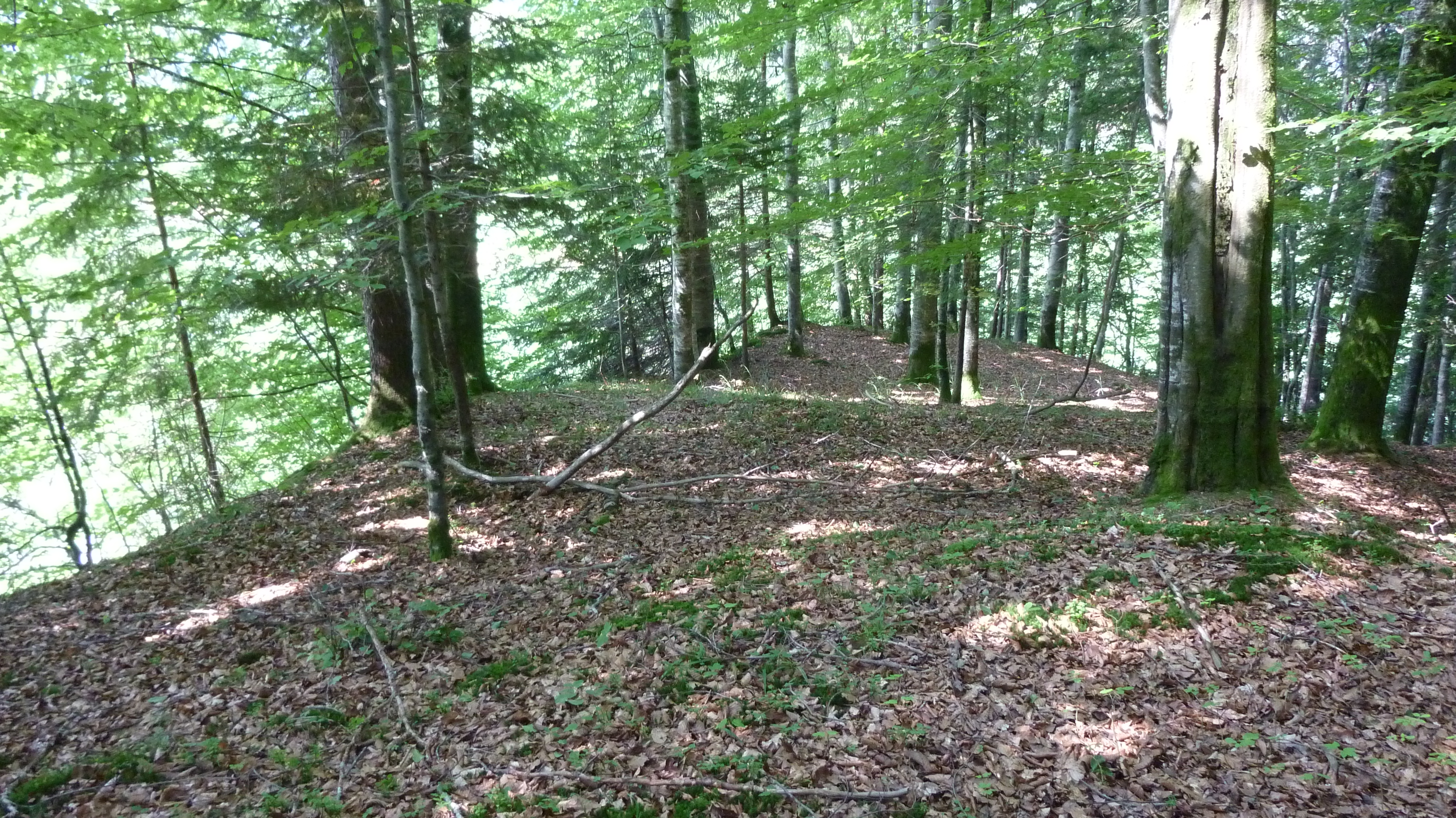 Kulturgüterschutz Kat A, Schweinsberg Erdwerk